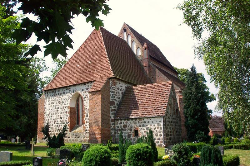 Kirche in Basse, einem Ortsteil von Lühburg, Mecklenburg-Vorpommern